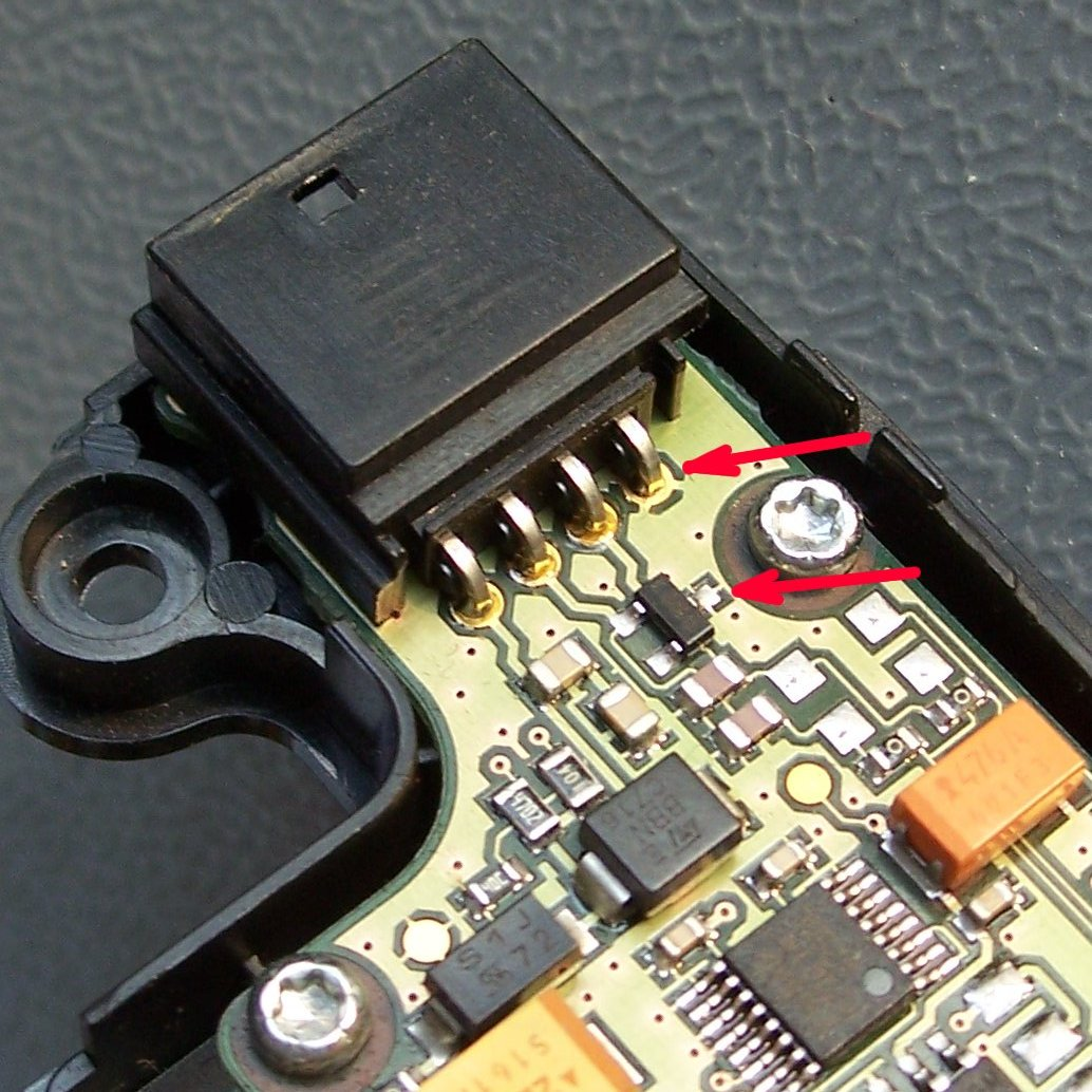 Ausschnitt einer Leiterplatte mit Thermal Pads (Markierung) für bedrahtete und SMD-Bauteilpads.